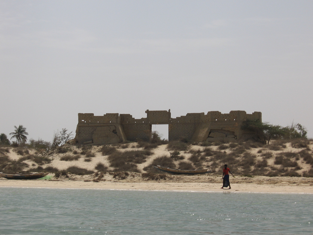 Vestiges dans le Parc national de la Langue de Barbarie (Sénégal)